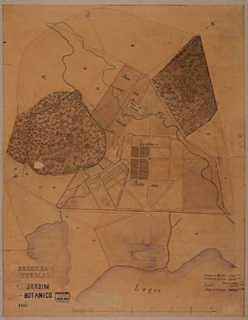 Mapa do Jardim Botânico e da Fazenda Normal do IIFA levantado por Karl Glasl em 1863